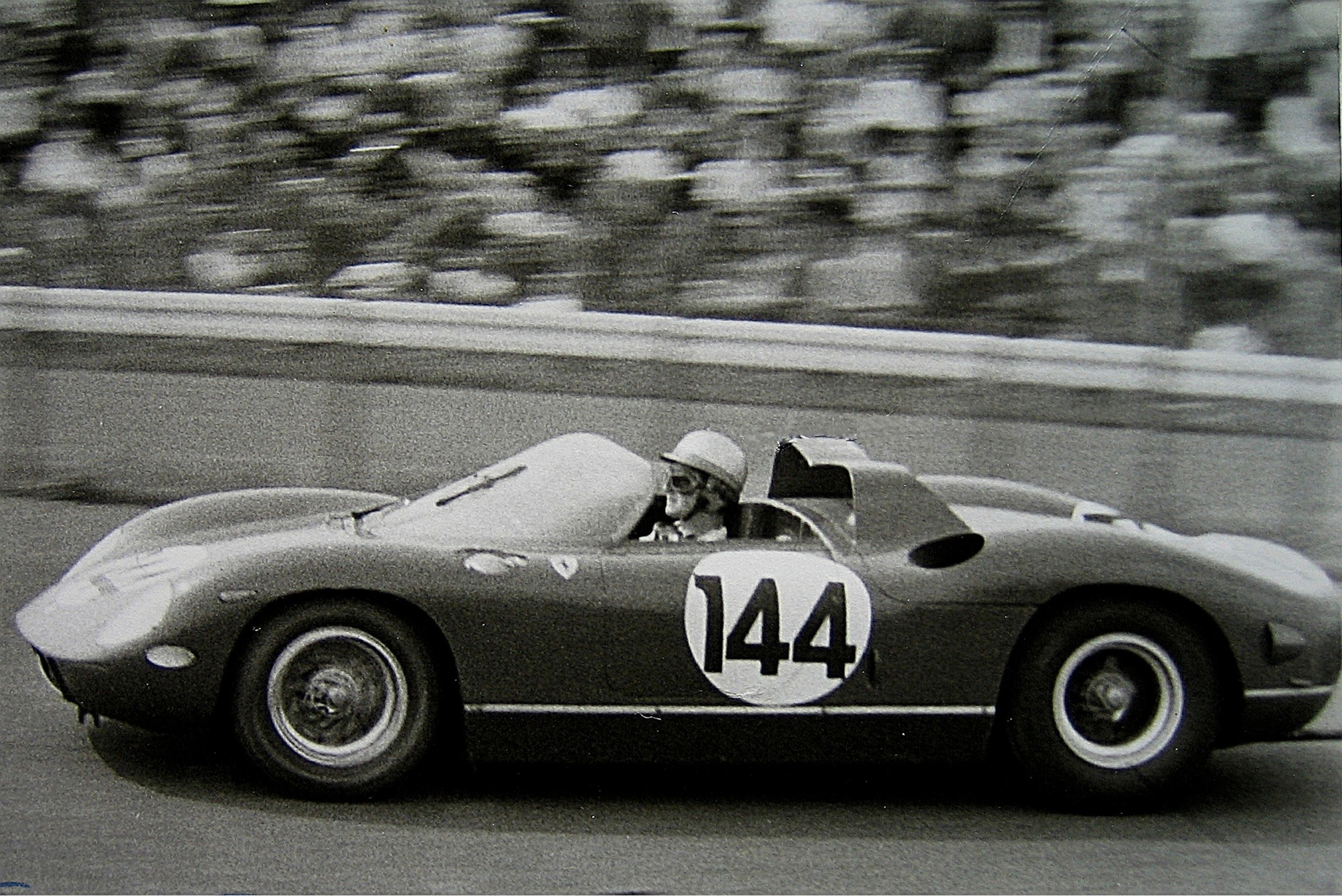 Ludovico Scarfiotti, Ferrari 275 P, beim 1000-km-Rennen auf dem Nürburgring am Ende der Start-und-Ziel-Geraden, eingangs Südkehre